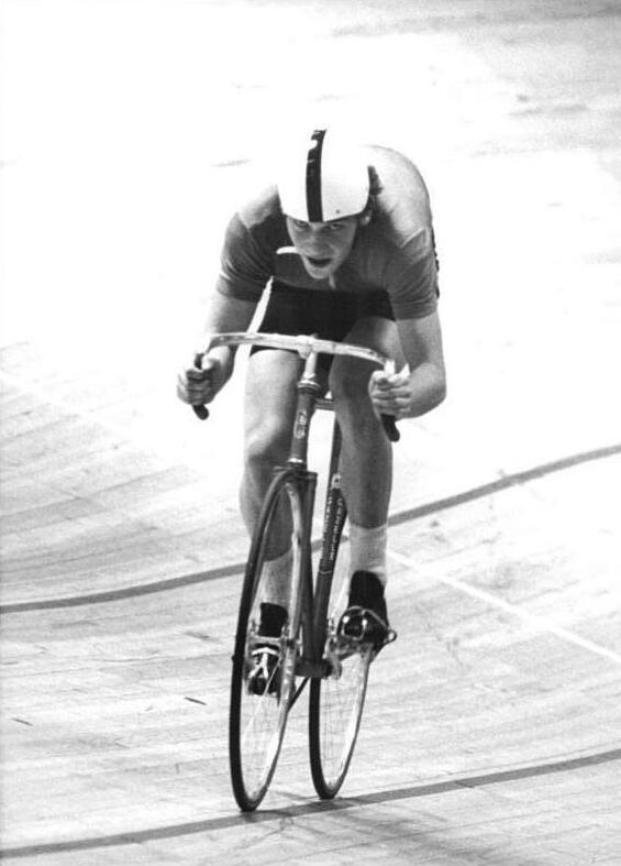 Lutz Haueisen ADN-ZB Koard 21.1.78 Berlin: Hallenmeisterschaft im 4000-m-Verfolgungsfahren - Unser Foto zeigt Lutz Haueisen von der SG Wismut Gera am 20.1.1978 in der Werner-Seelenbinder-Halle.